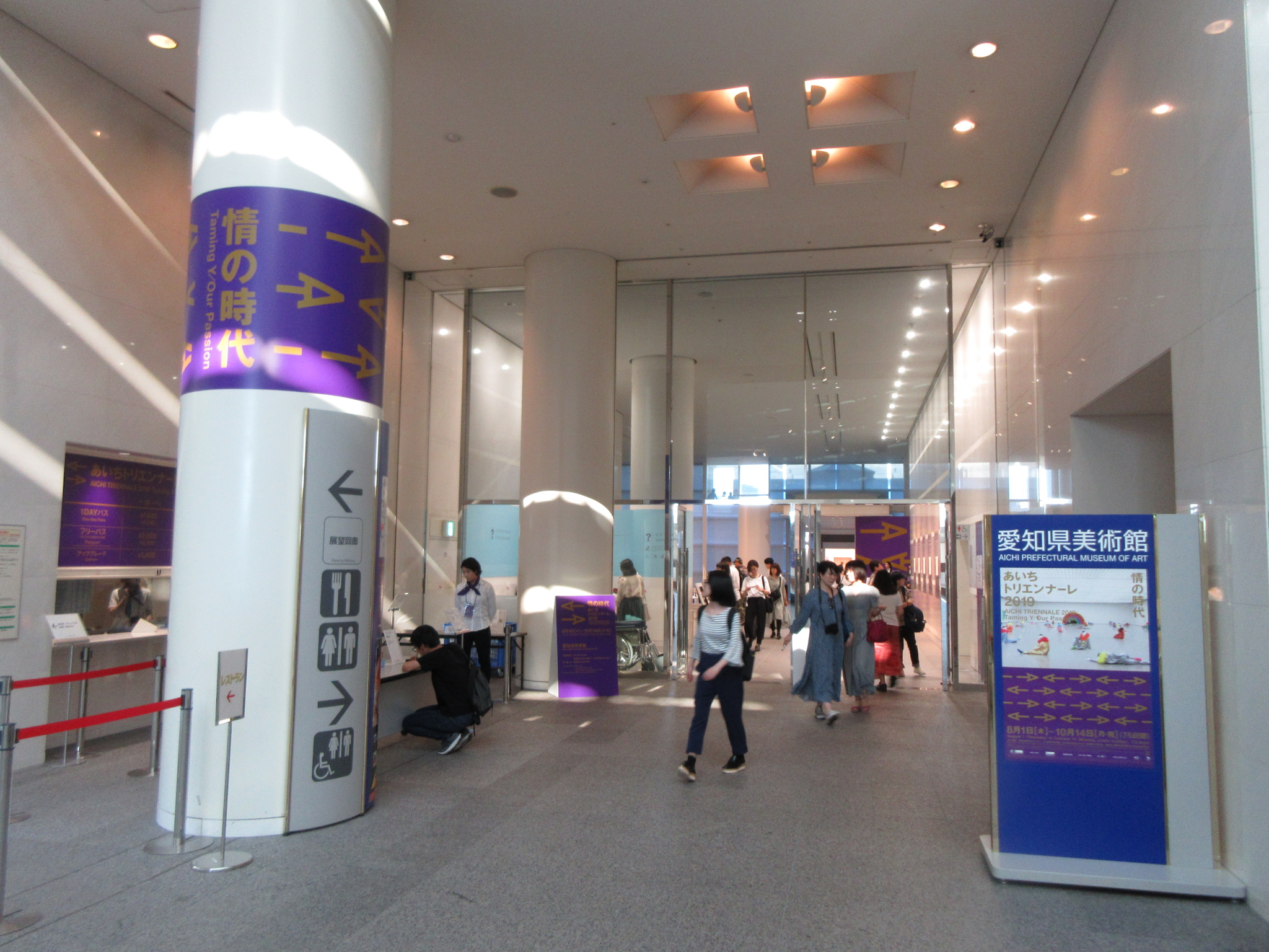 愛知県美術館（名古屋市東区東桜）。あいちトリエンナーレ2019の会期中。